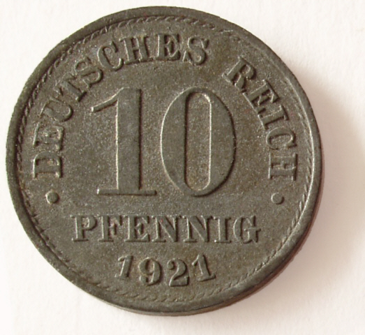 Deutsches Reich, 10 Pfennig, 1921, d=21 mm, 3.5 gramm, zinc